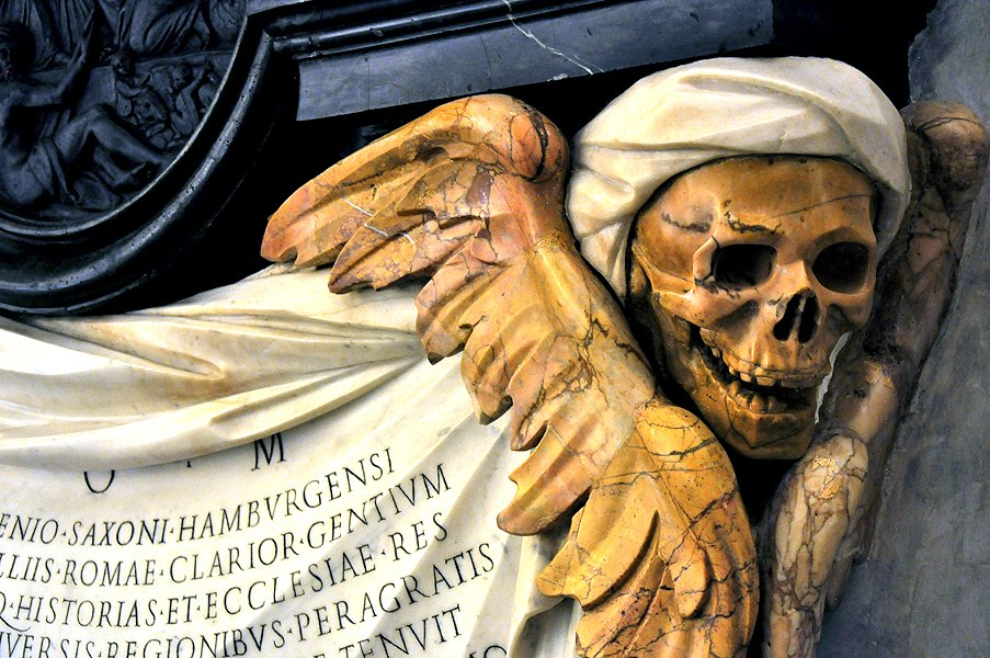 Memento Mori Darstellung